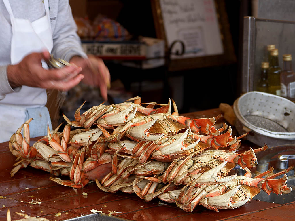 Dungeness crabs